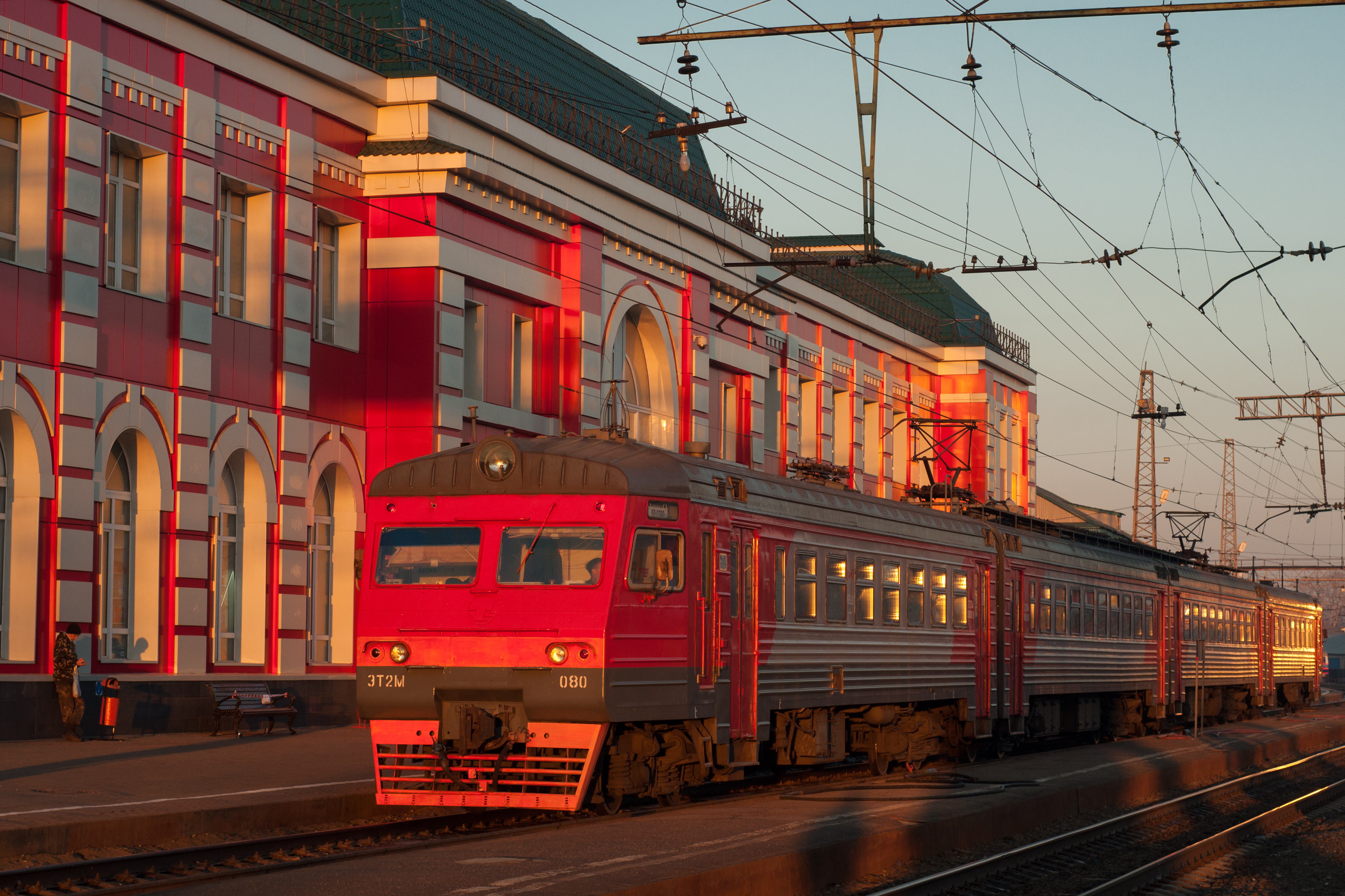 Здание железнодорожного вокзала, где во время прибытия агитационно-инструкторского поезда Октябрьская революция перед трудящимися города выступал председатель ВЦИК Калинин М.И.: ж/д вокзал, Рузаевка, Мордовия